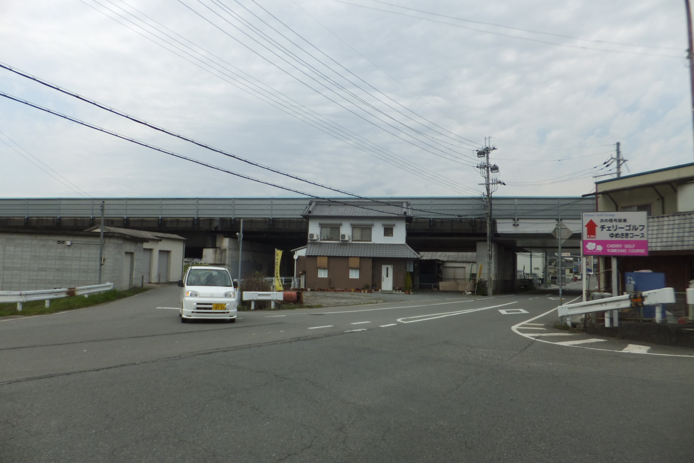 兵庫県姫路市夢前町前之庄 兵庫県道67号姫路夢前線